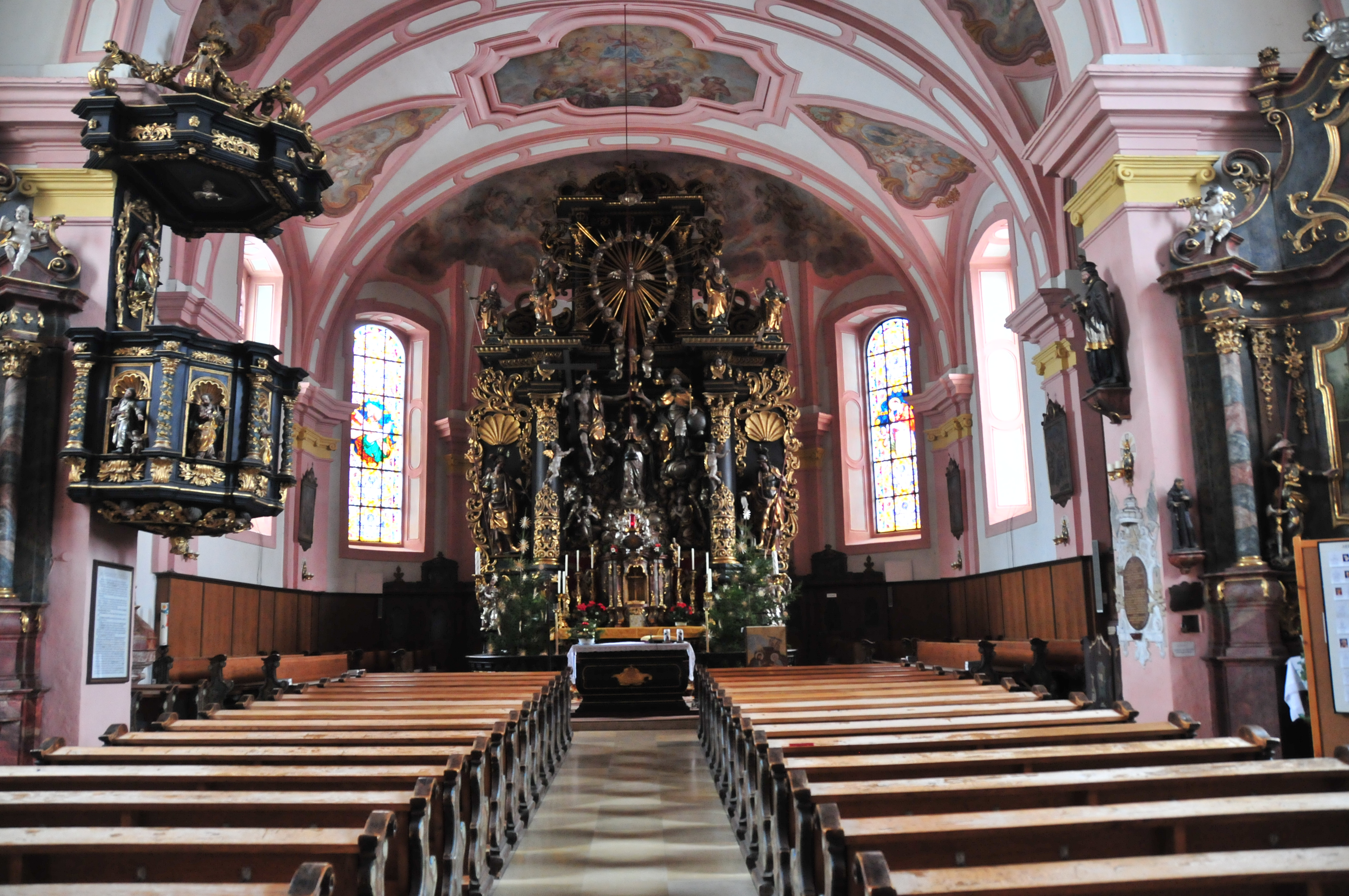 Innenraum der Pfarrkirche Vorchdorf